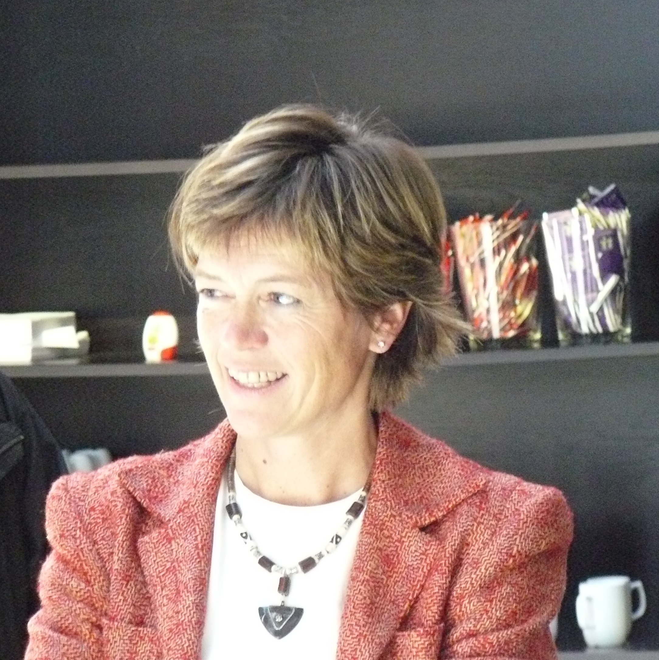 Grete Ingeborg Nykkelmo, Norway